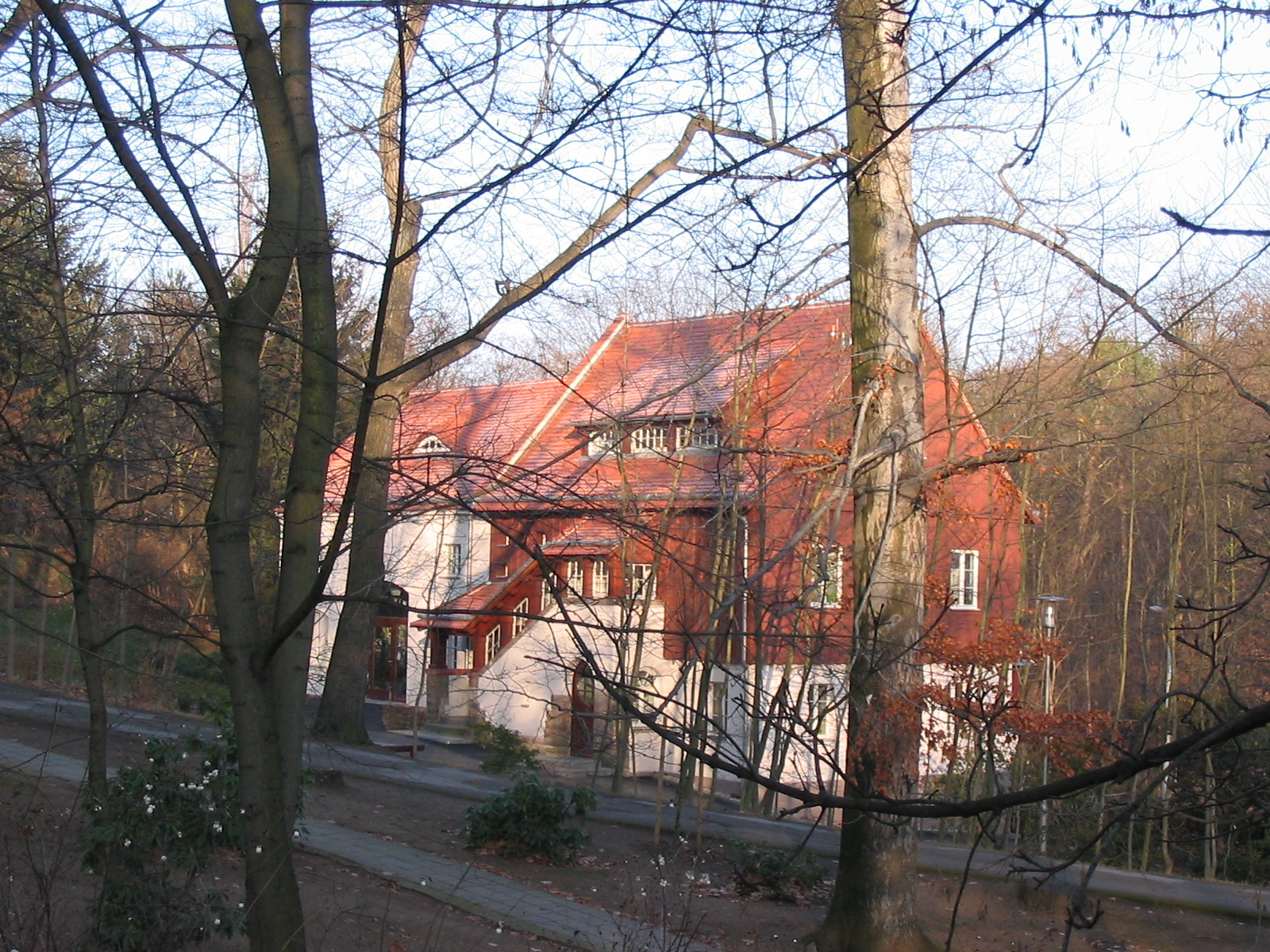 Radebeul Mohrenhaus Gärtnerhaus